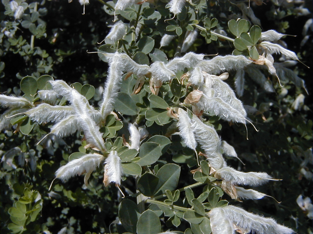 Genista monspessulana. Real Jardín Botánico, Madrid.